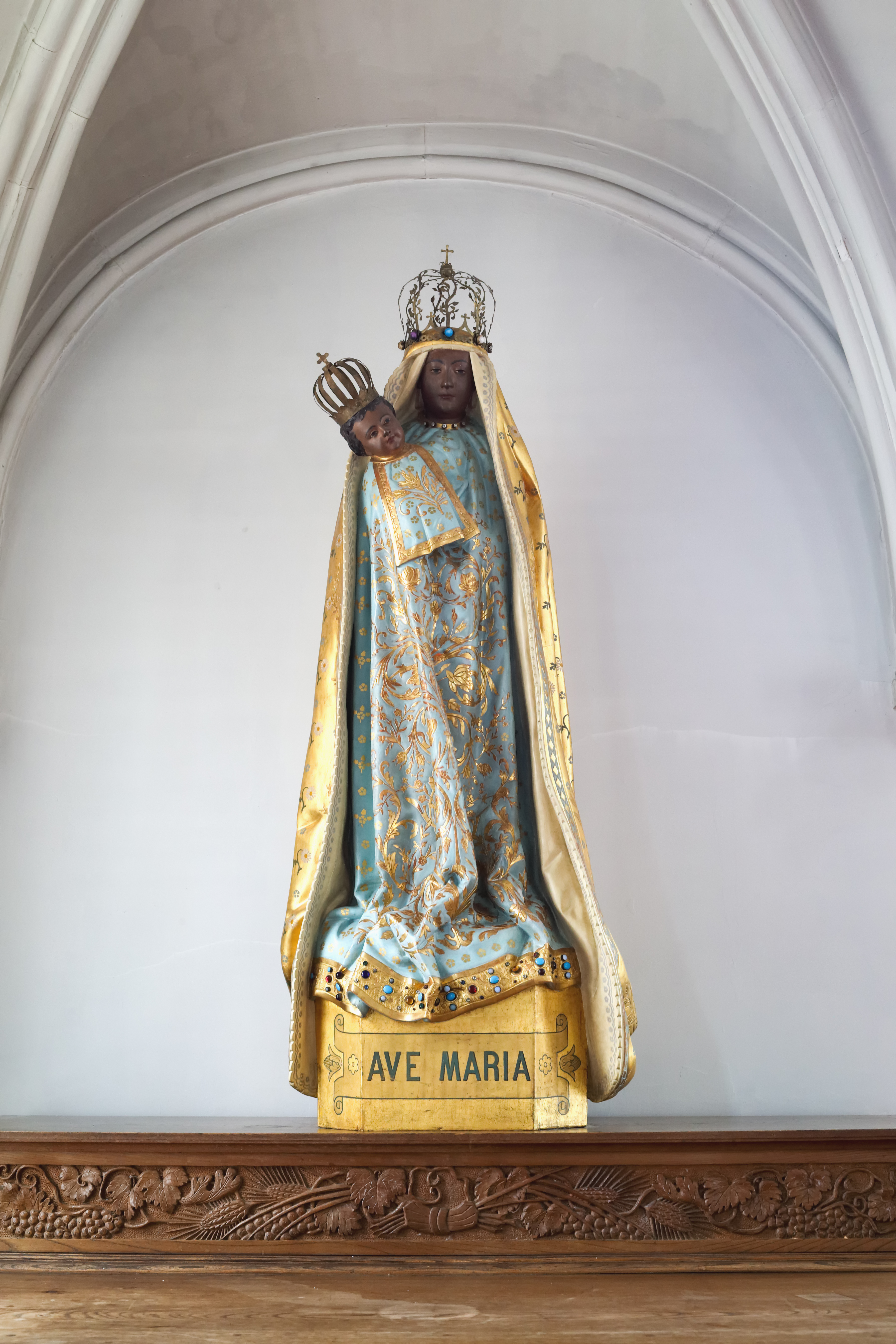 山形県鶴岡市にある鶴岡カトリック教会天主堂に安置された、日本国内では唯一の黒い聖母像。